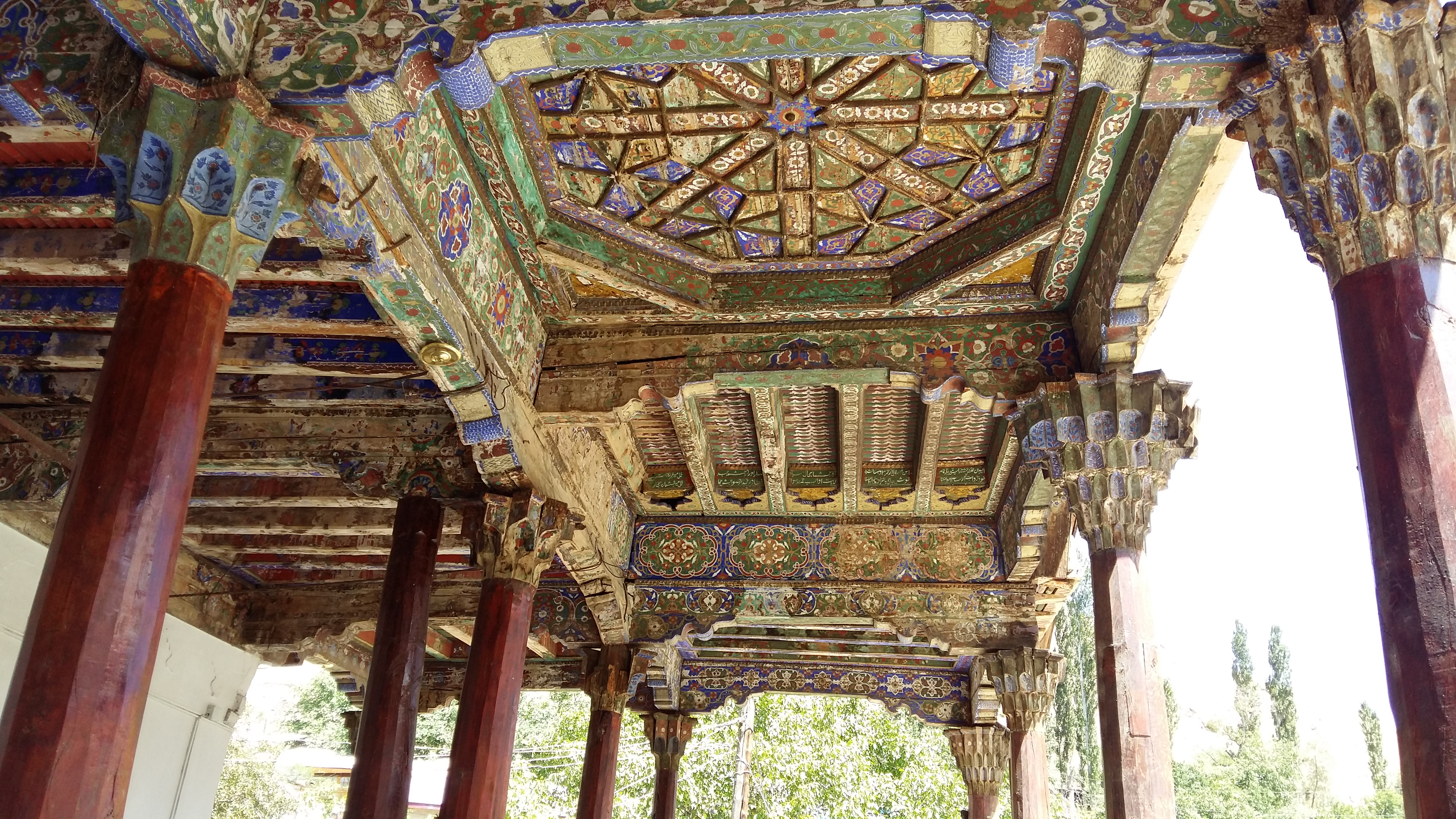 Тоҷикӣ: Ороиши сутунҳои масҷиди деҳаи Дардар, ноҳияи Айнӣ